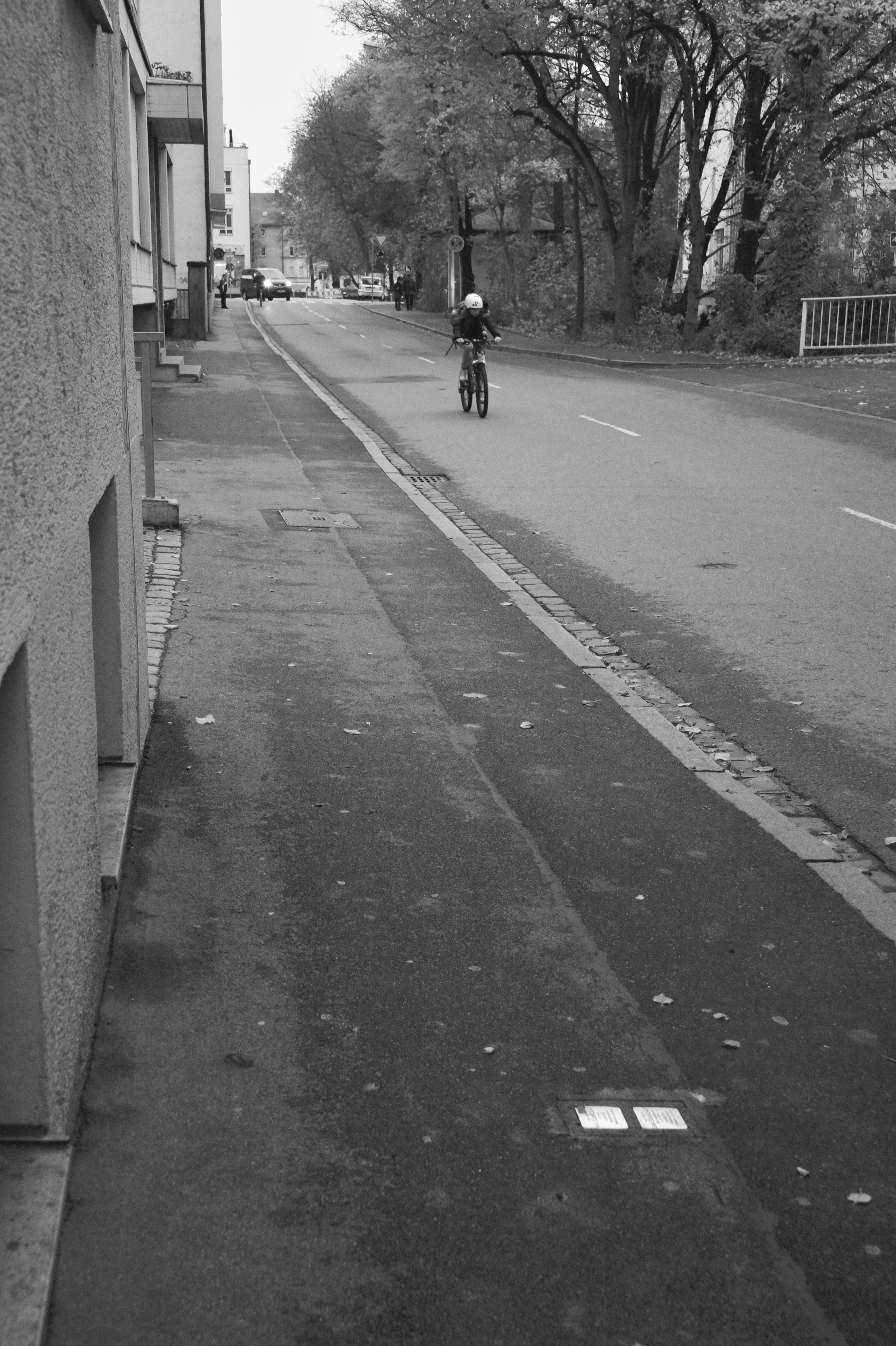 Stolpersteine in Straubing